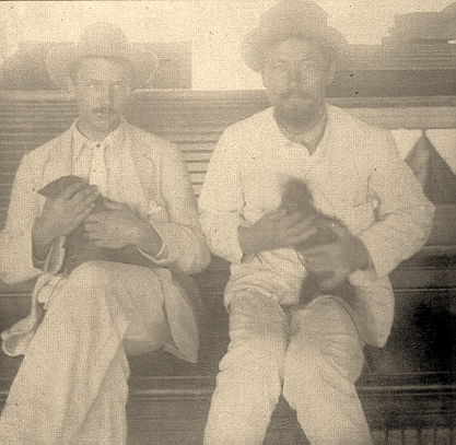 Антон Павлович Чехов и мичман Глинка с мангустами на палубе парохода "Петербург" после выхода с о. Цейлон